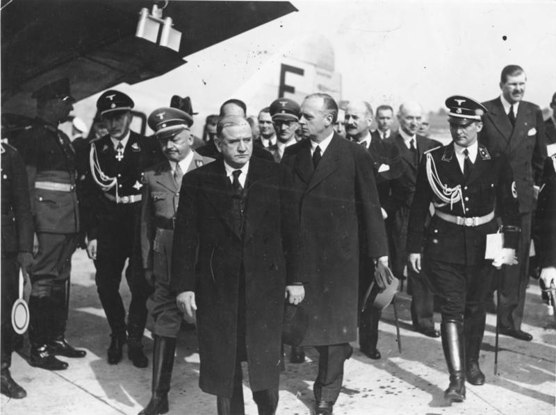 Scherl: Historische Stunden in München. Die Landung des französischen Ministerpräsidenten Daladier auf dem Münchener Flughafen Oberwiesenfeld [am 29.9.1938]. Hinter dem Ministerpräsidenten von links nach rechts: Gauleiter Adolf Wagner, Oberbürgermeister Fiehler, Reichsaussenminister von Ribbentrop, der französische Botschafter Francios-Poncet und ganz rechts der Chef des Protokolls Frhr.v. Dörnberg [Doernberg]. 12861-38